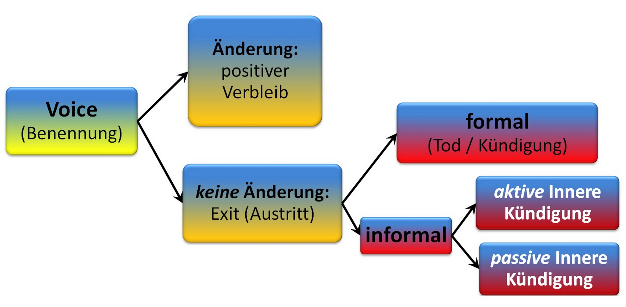 Coping Strategien bei Unterforderung von Arbeitnehmern nach Elisabeth Prammer: Boreout - Biografien der Unterforderung und Langeweile : eine soziologische Analyse. Springer Fachmedien, Wiesbaden 2013, ISBN 978-3-658-00502-3, S. 136